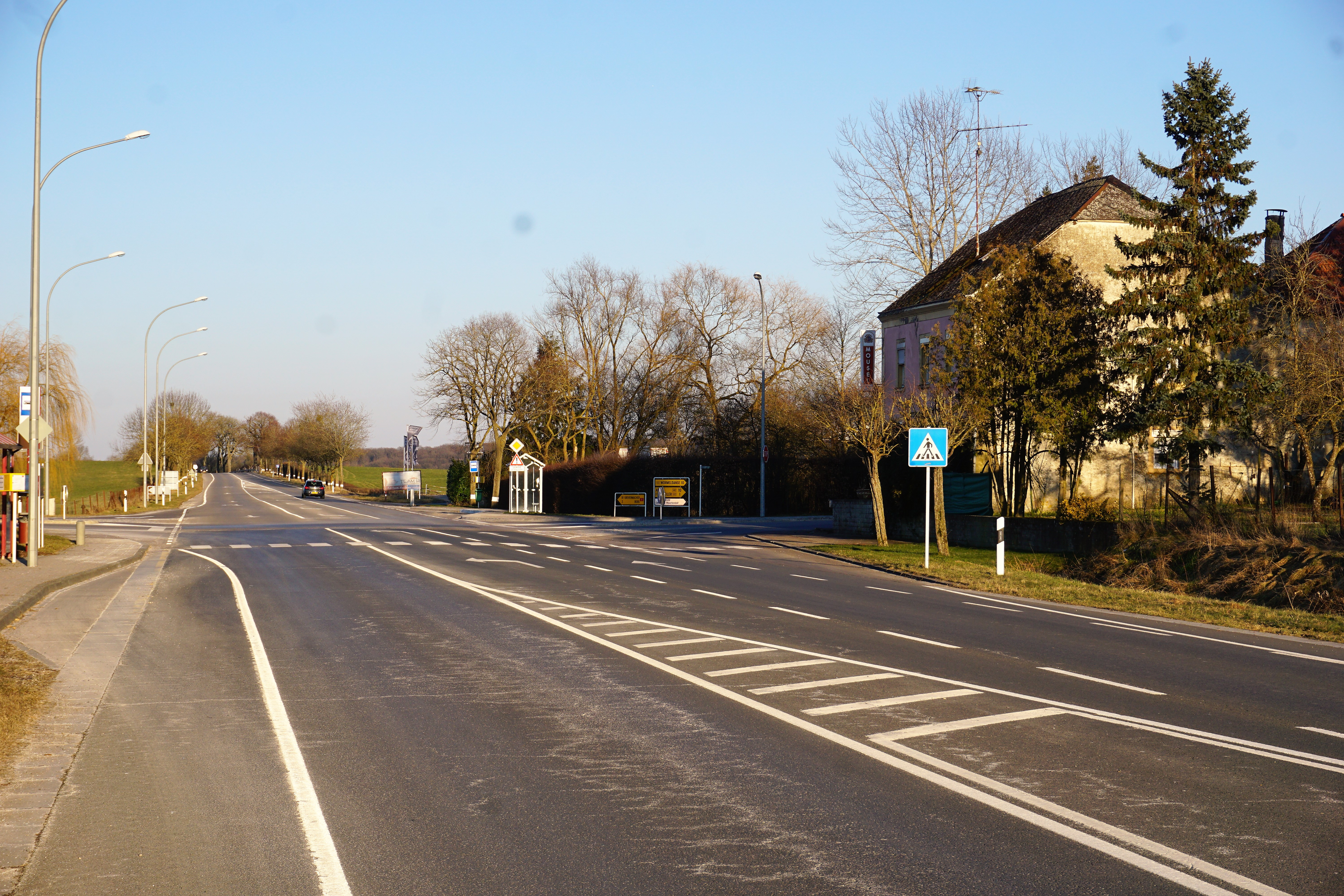 Banzelt, lieu-dit dans la commune de Betzdorf. Vue en direction nord-est.